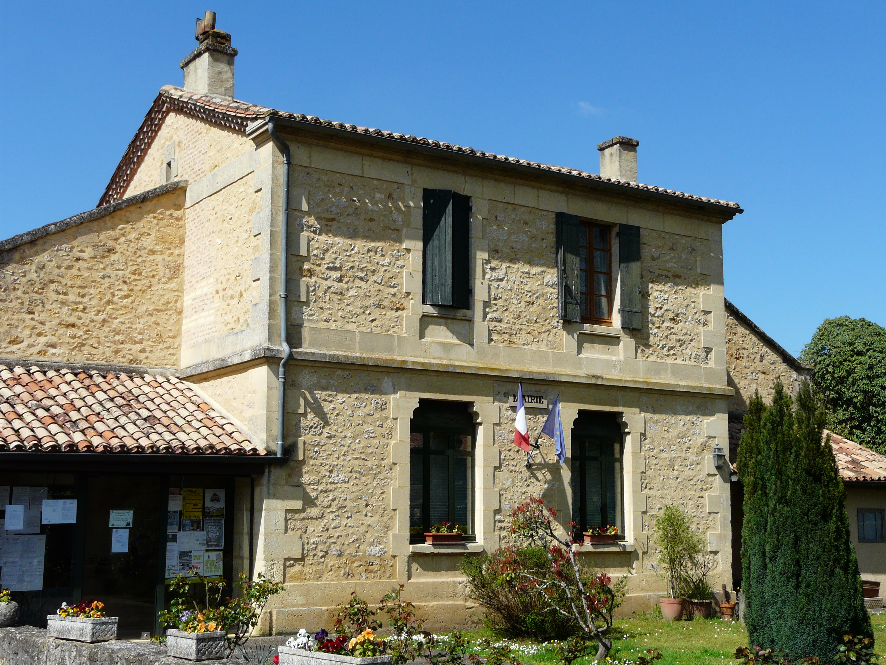 La mairie de Pontours, Dordogne, France.